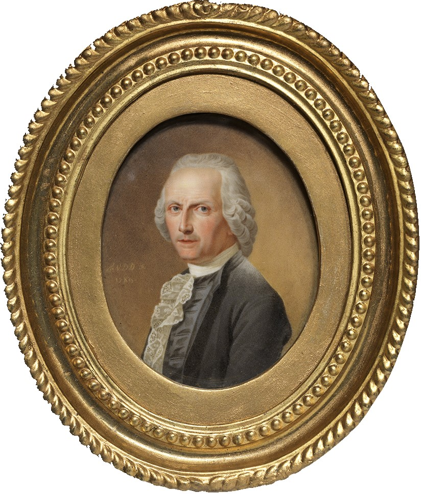 Portret van Paul Josef de Cock (Joseph Octave van der Donckt, 1789); collection: Musea Brugge - Groeningemuseum